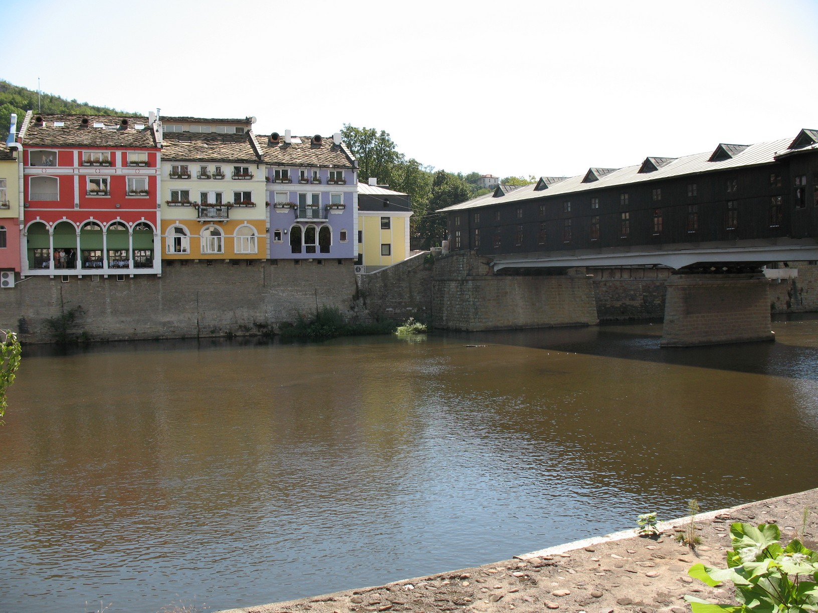 Lovech